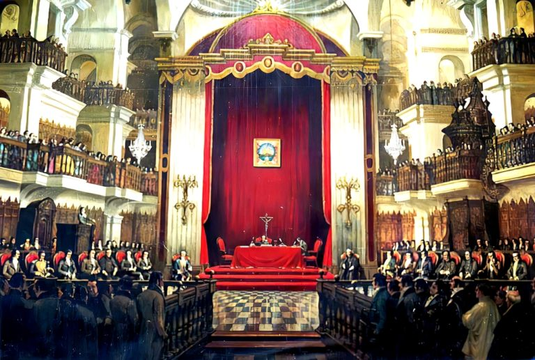 Pintura del Primer Congreso Constituyente del Perú que tuvo lugar en la capilla de la Universidad de San Marcos (1822).